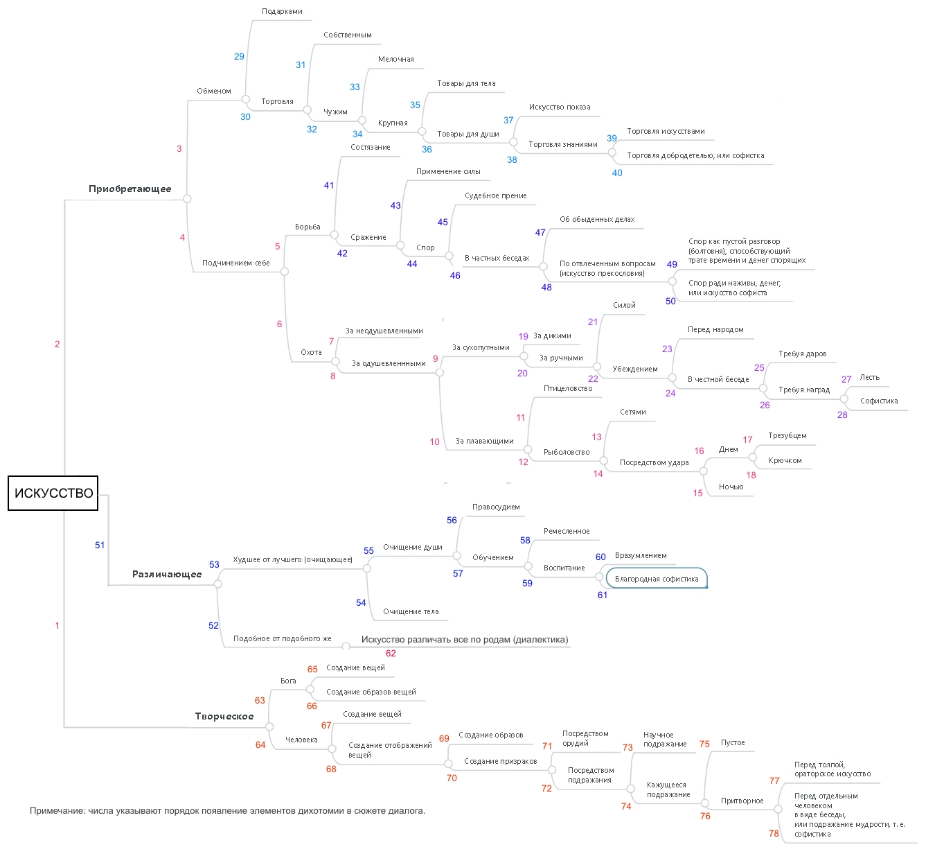 Дихотомическое дерево диалога «Софист» Платона